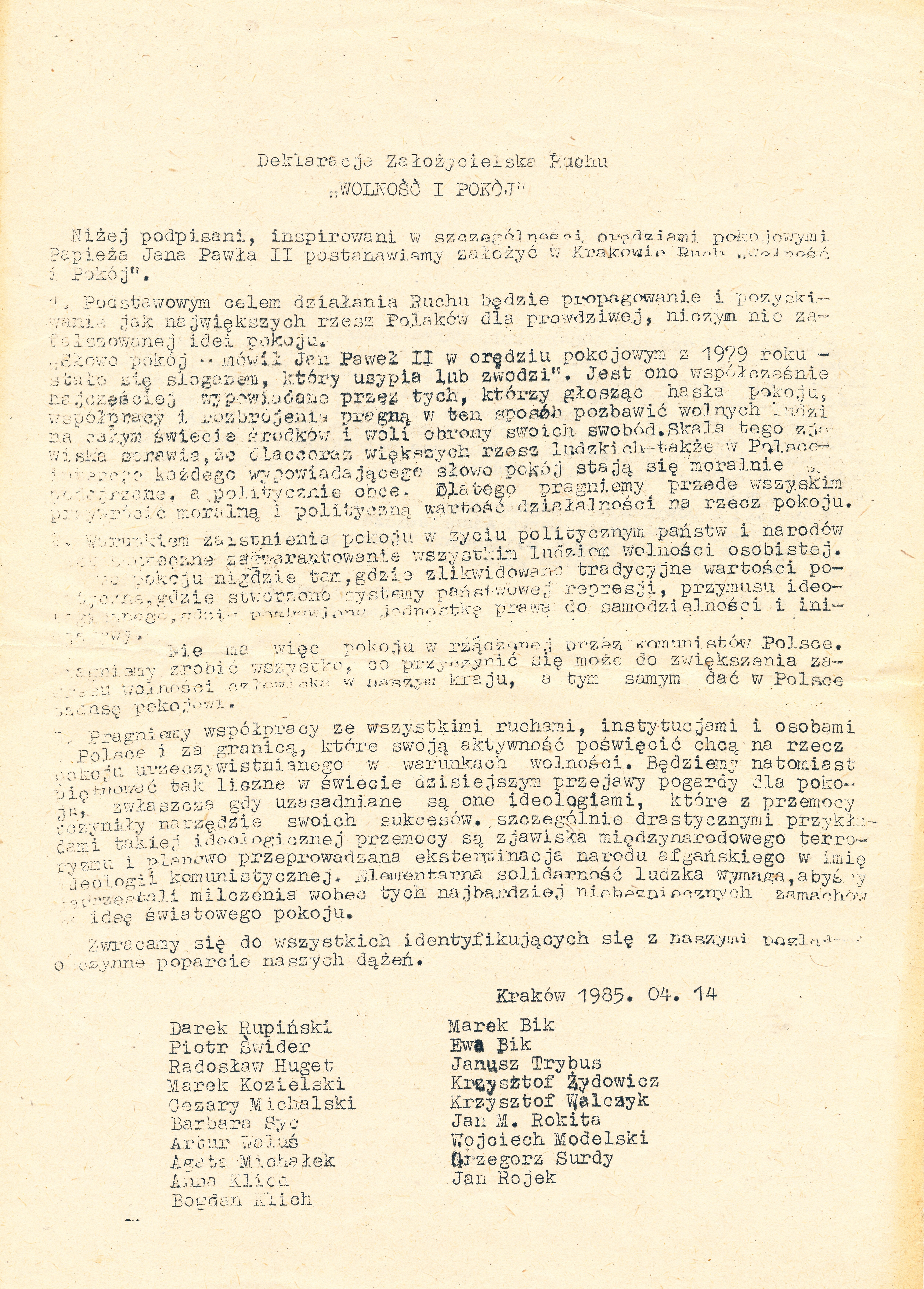 oryginalna deklaracja założycielska Ruchu Wolność i Pokój, rozprowadzana w Krakowie w kilka dni po ukonstytuowaniu się Ruchu